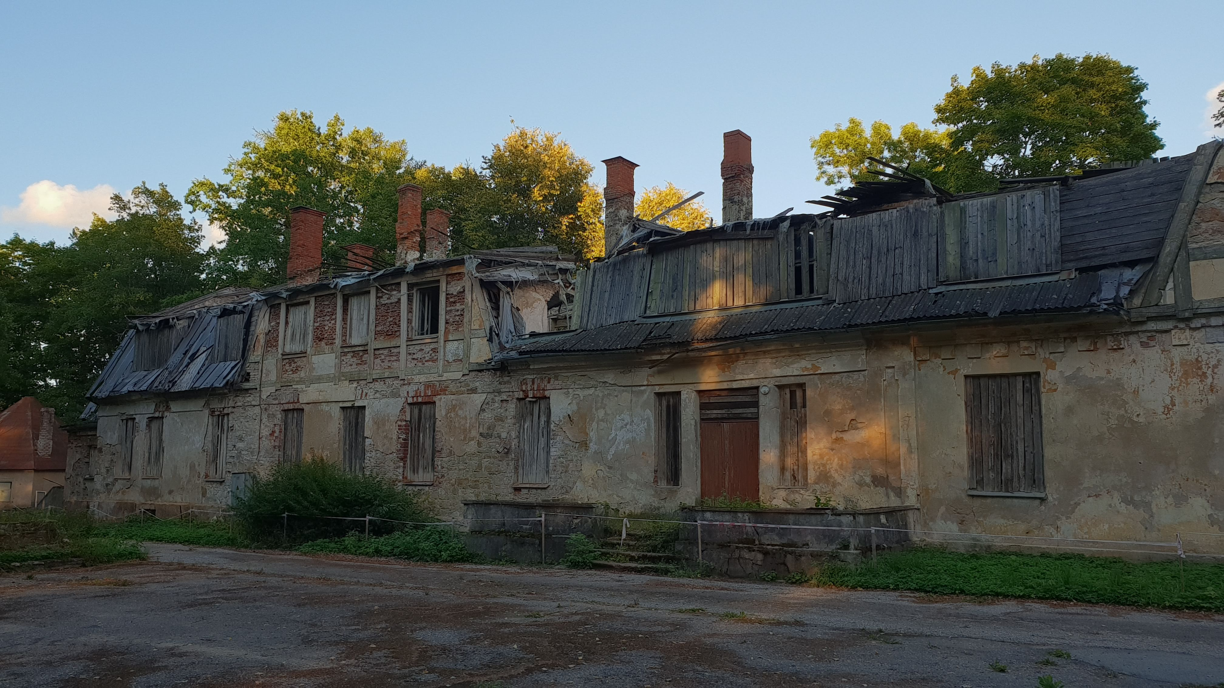 Hopa mõisa peahoone 2018. aastal